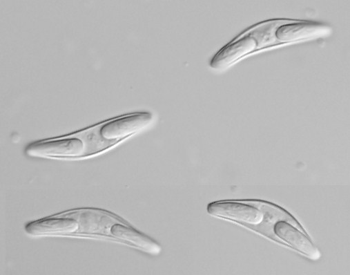 Споры слизистого споровика Sphaeromyxa hellandi